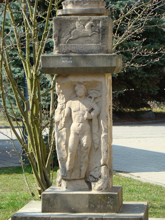 Detail der Jupitergigantensäule (Replik) in Berwangen